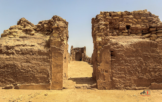 كنيسة القصير اقدم كنيسة في الشرق تقع في قلب بادية كربلاء